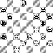 Фрагмент партии Нежметдинов-Коврижкин, 1951